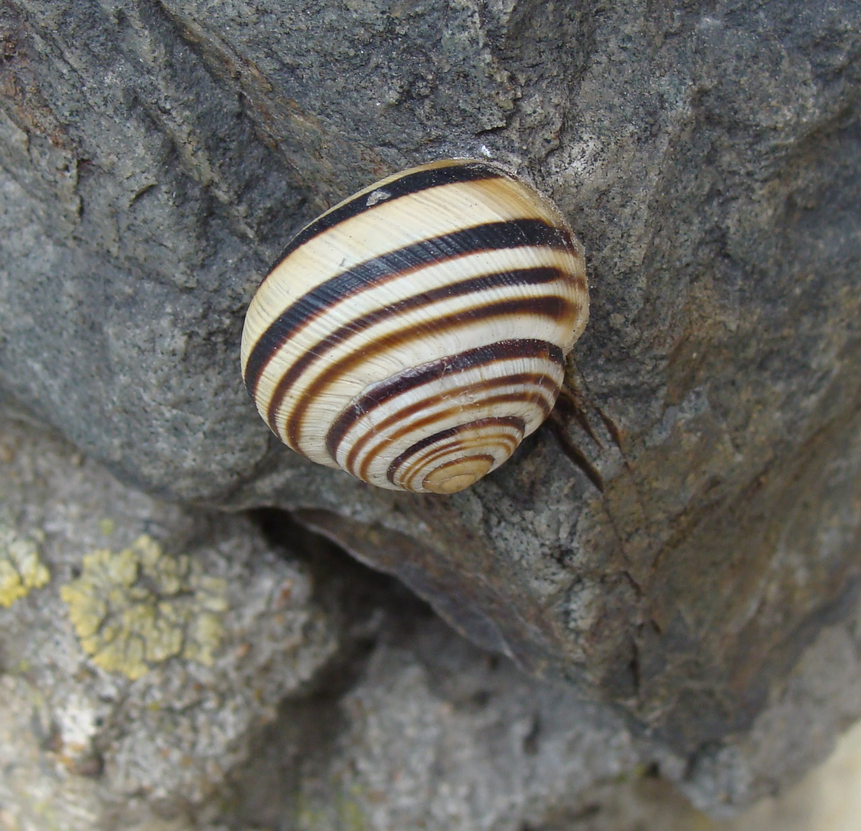 Wstężyk austriacki, Cepaea vindobonensis